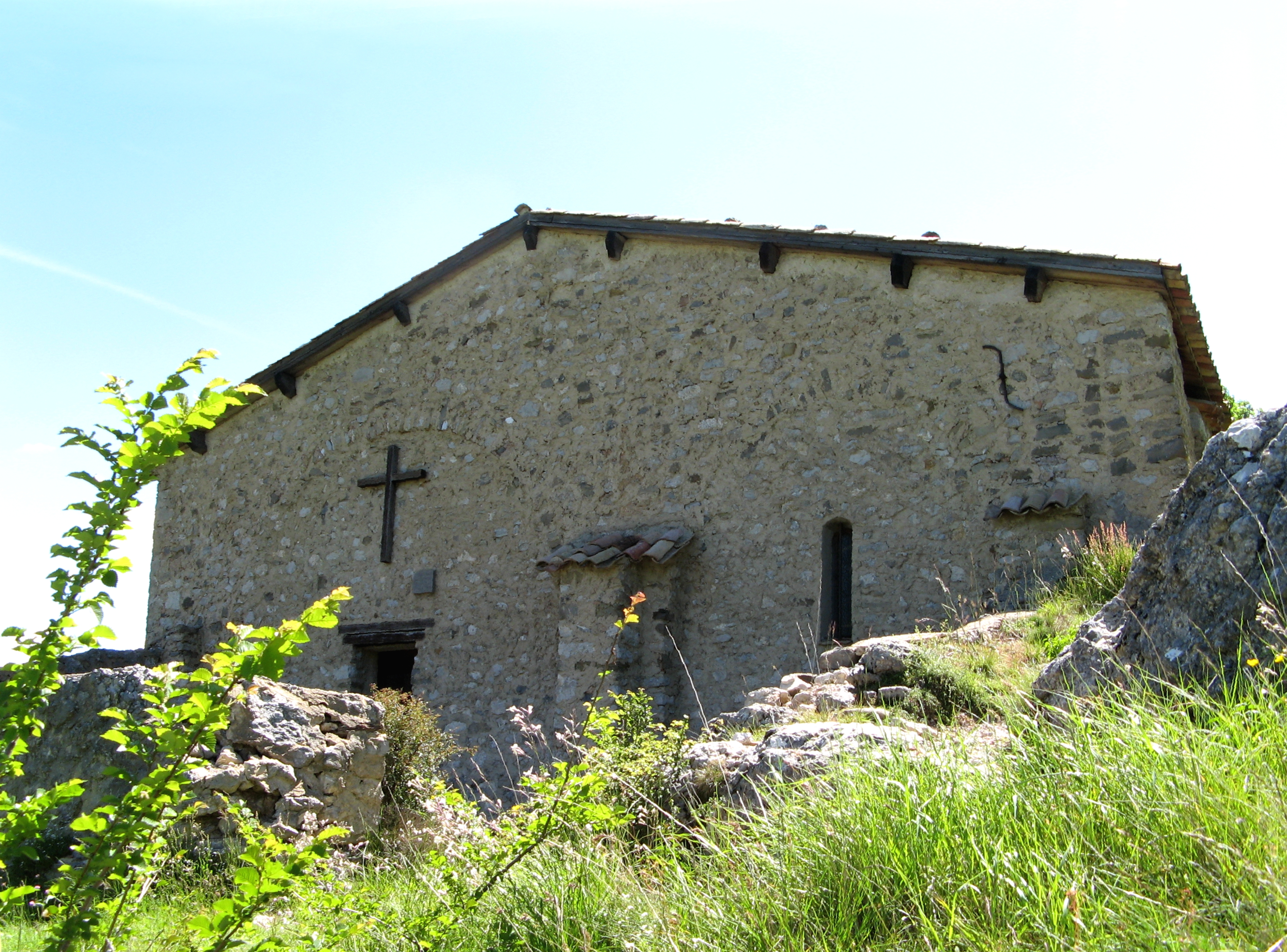 Saint-Geniez / Chabert, Alpes-de-Haute-Provence, Provence-Alpes-Côte d'Azur, Frankrijk. Kapel Onze-Lieve-Vrouw van Dromon XIIde eeuw met crypte VIIIde / IXde eeuw. Herbouwd helft XVIIde eeuw. Gerestaureerd in de jaren 1970.